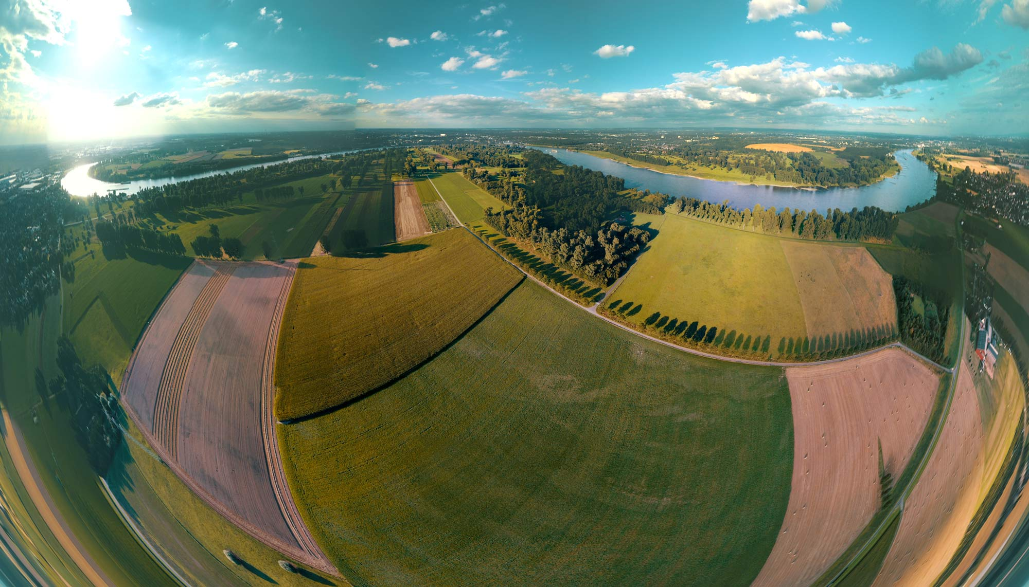 Die Rheinschleife beim Zonser Grind in der Nähe von Dormagen. Hier macht der Rhein fast einen U-Turn. Die Aufnahme ist ein Panorama mit Fischauge-Projektion und deswegen zu den Rändern rechts und links hin verzerrt. Luftaufnahme. Die Gemeinde Zons befindet sich ganz rechts im Bild.